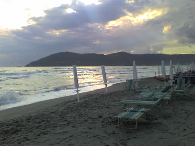 Punta Bianca vista dalle spiagge di Marina di Carrara. Immagine di mia proprietà e rilasciata con licenza GFDL.